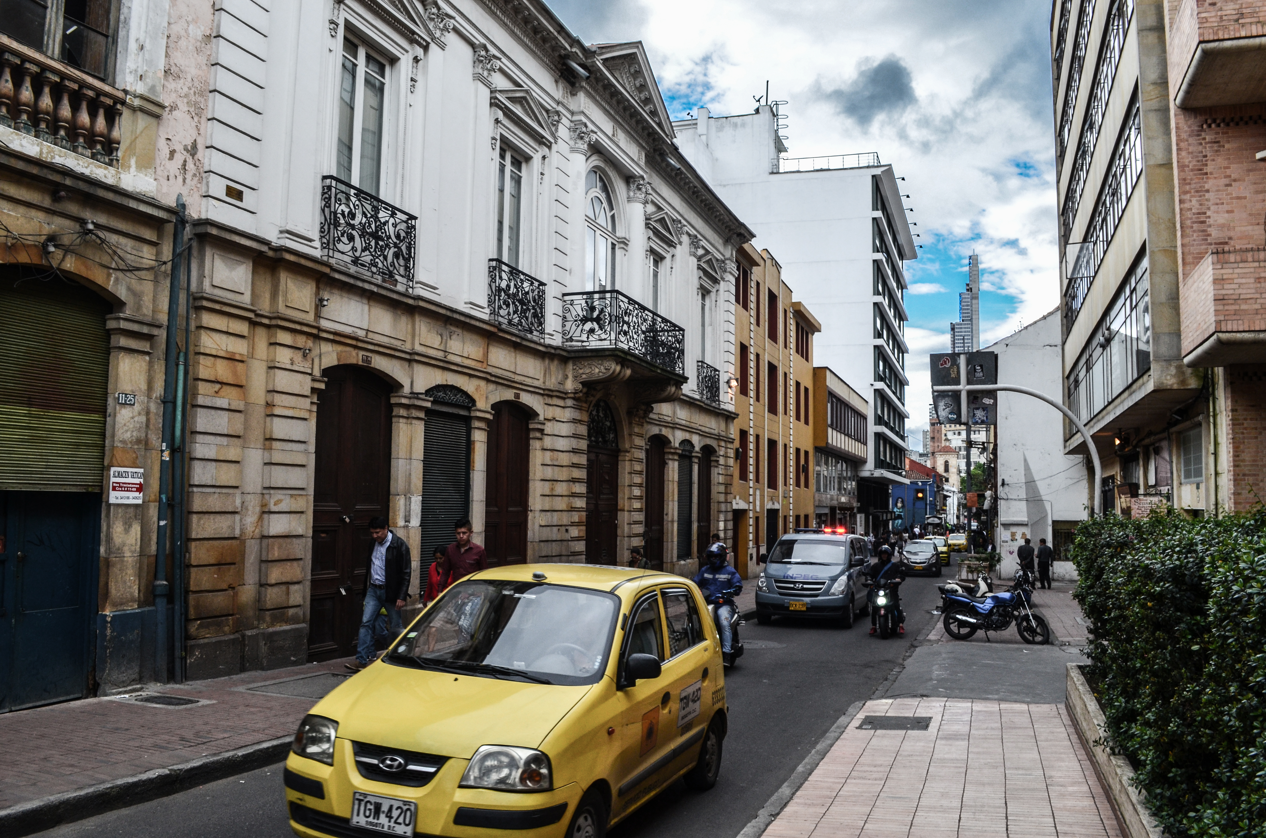 Foto de Centro Bogotano tomada por colectivo Ojotabogo